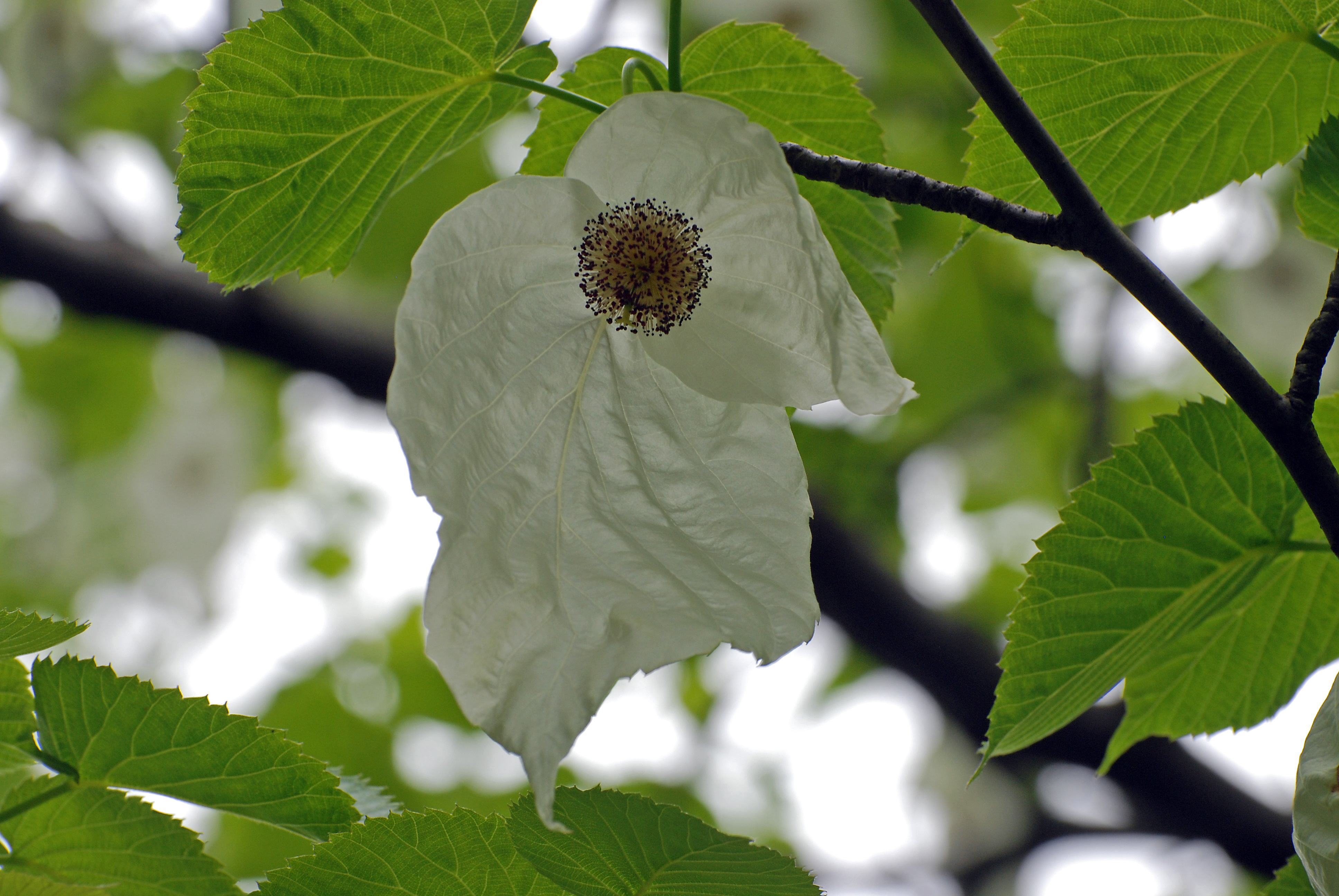 Näsduksträd